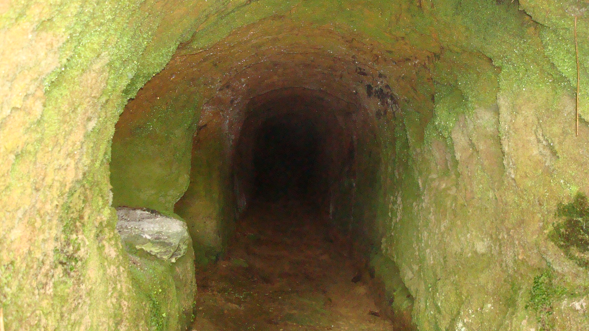 Unha imaxe das galerías das antigas minas.